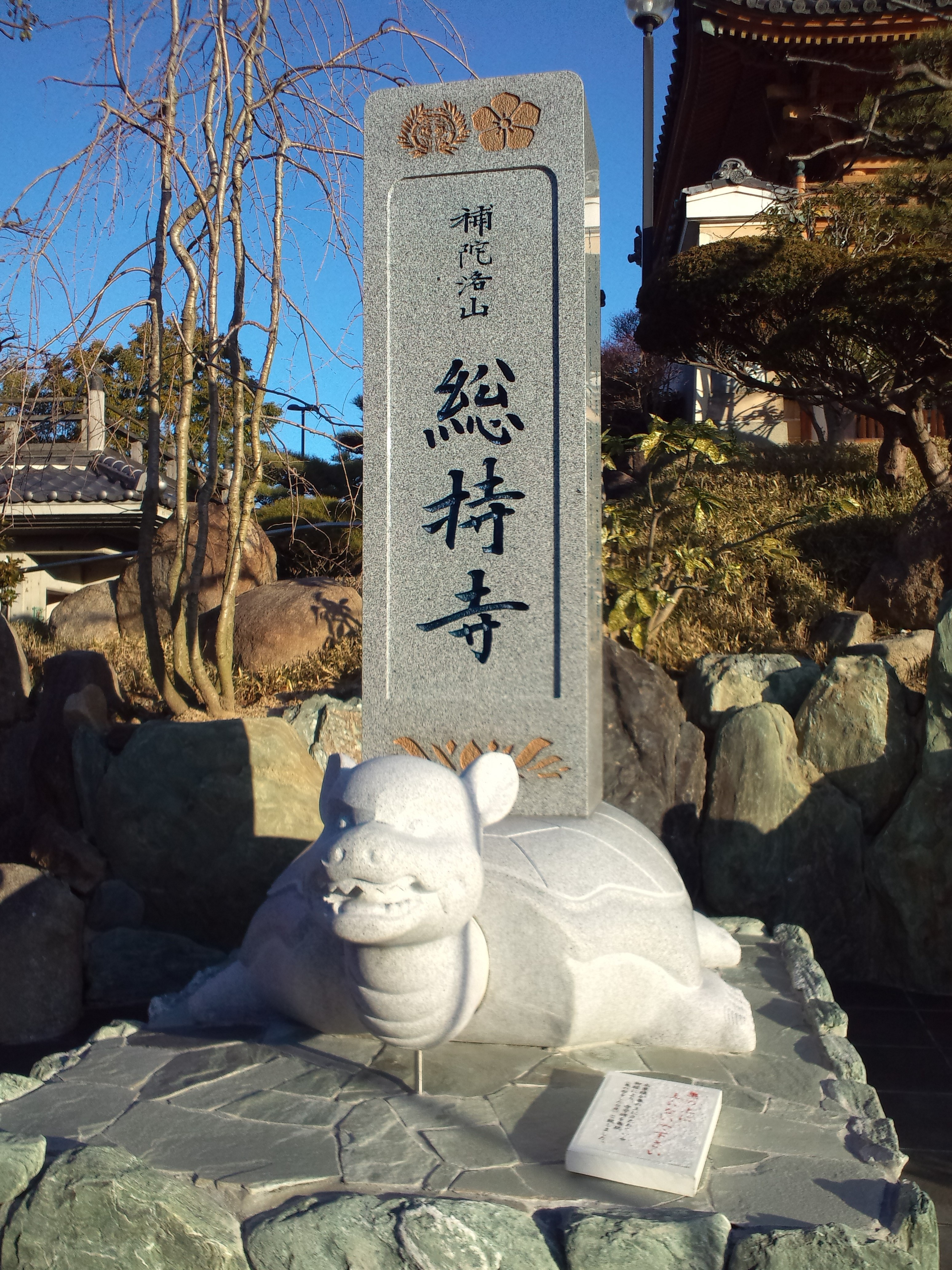 総持寺 入口の石碑